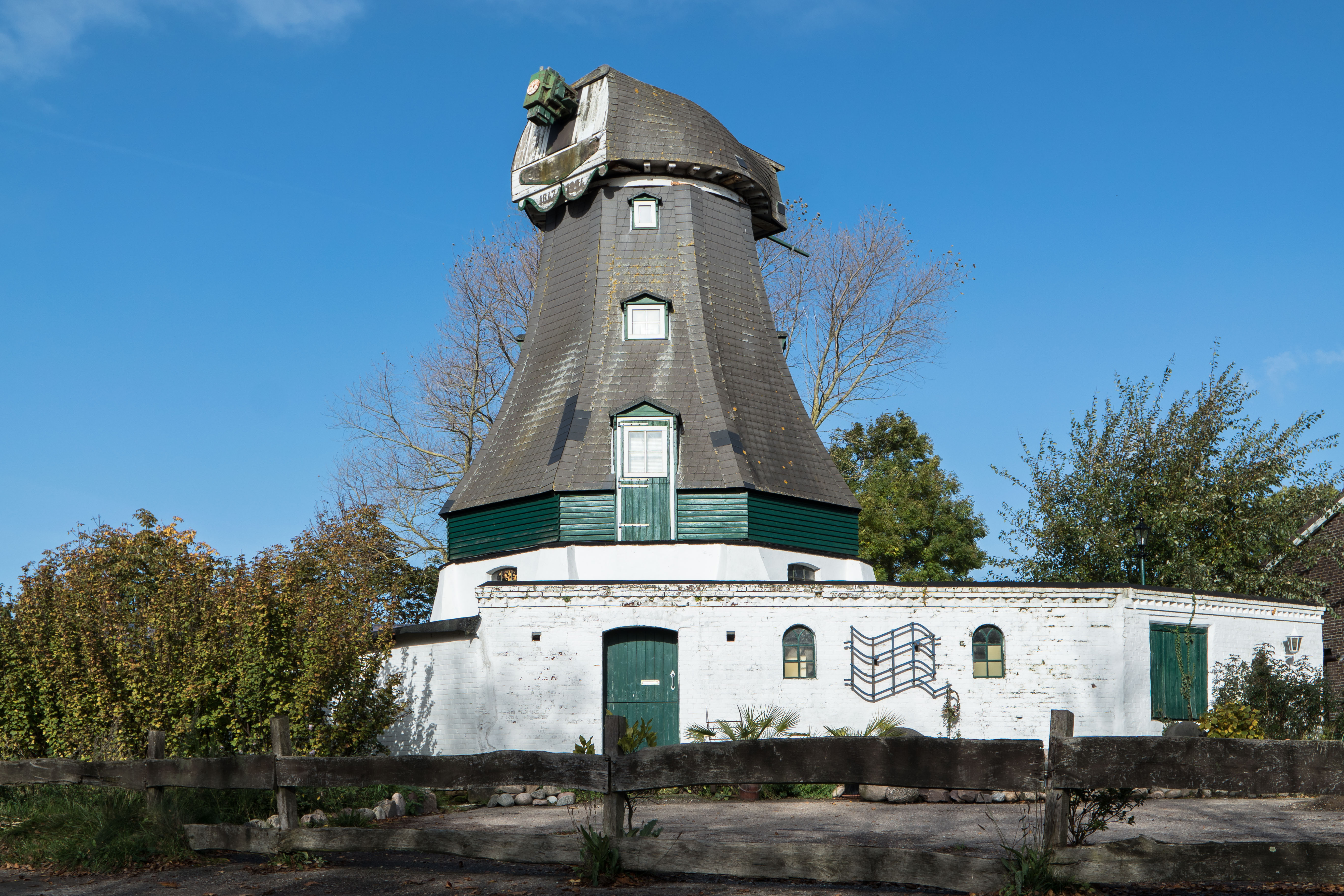 Windmühle Germania Wöhrden